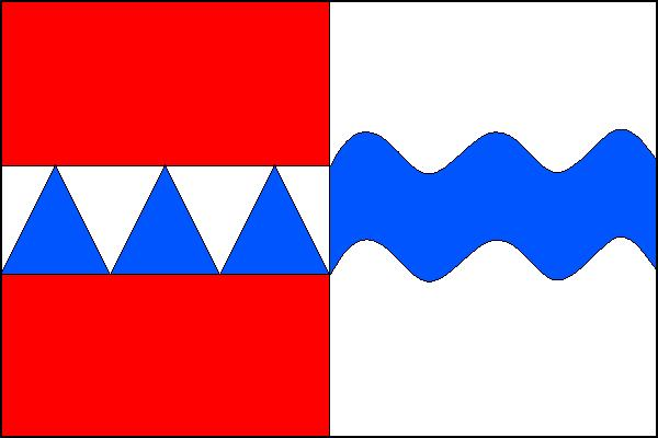 Vlajka obce Studánka (okres Tachov)